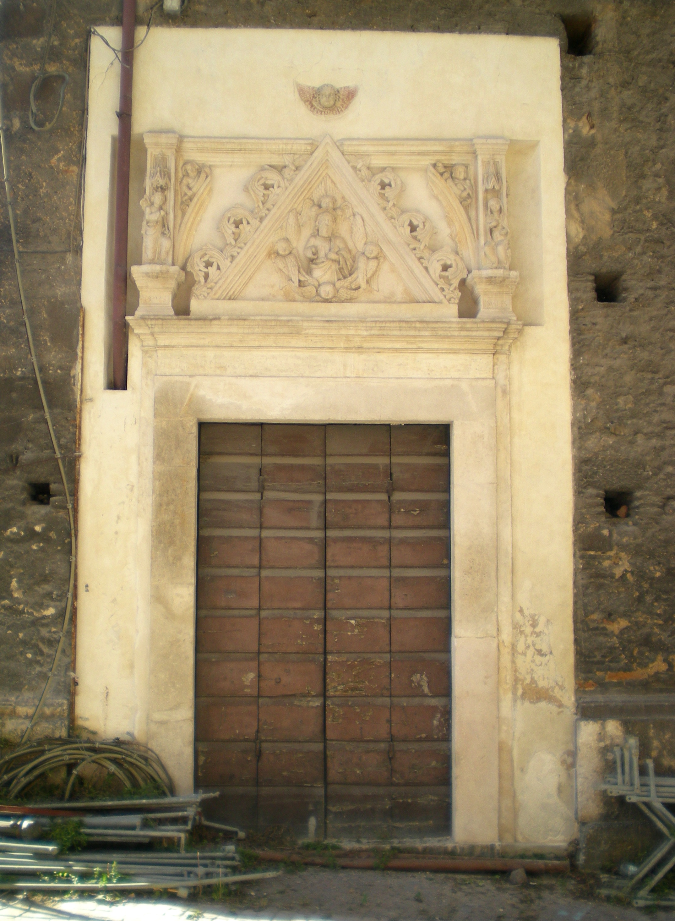 Resti del ciborio del Duomo dell'Aquila, oggi visibili sulla parete laterale della chiesa di Santa Margherita